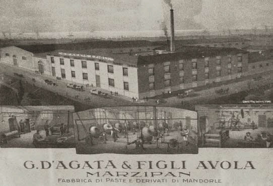 Incisione (1900 circa) rappresentando la fabbrica Marzipan, Avola – Italia.